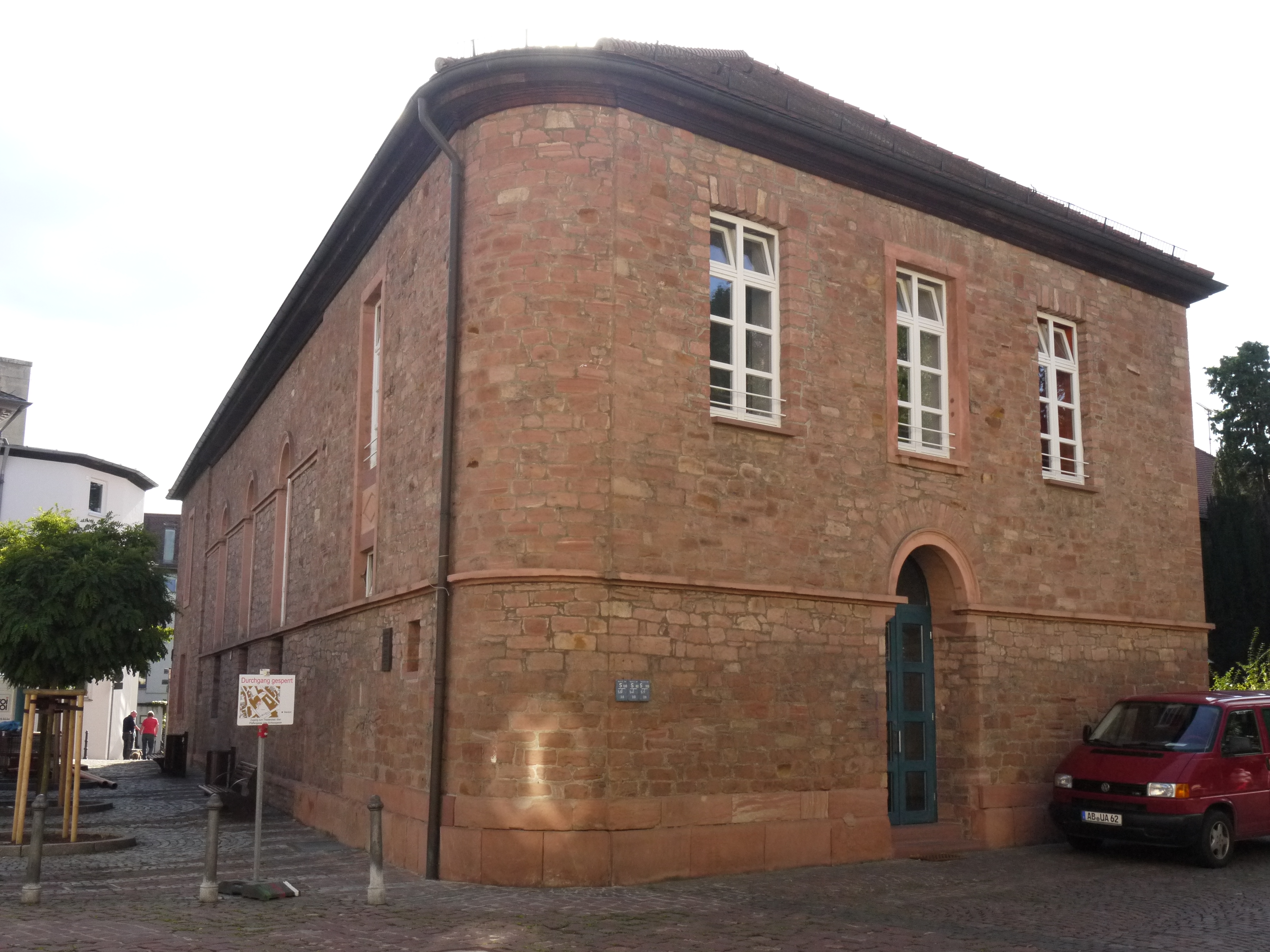 Bachsaal in der Pfaffengasse 13 (ehem.Casinogebäude) in Aschaffenburg (denkmalgeschützt)